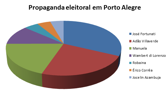 Distribuição do Horário Eleitoral Gratuito nas eleições municipais de 2012 em Porto Alegre.